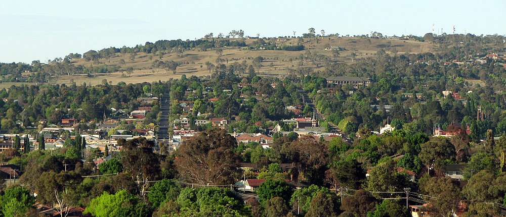 Armidale overview